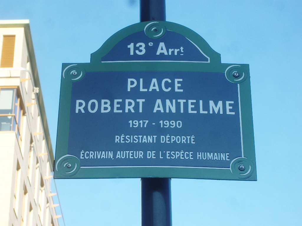 Paris 13e arrondissement - Place Robert-Antelme - plaque de rue